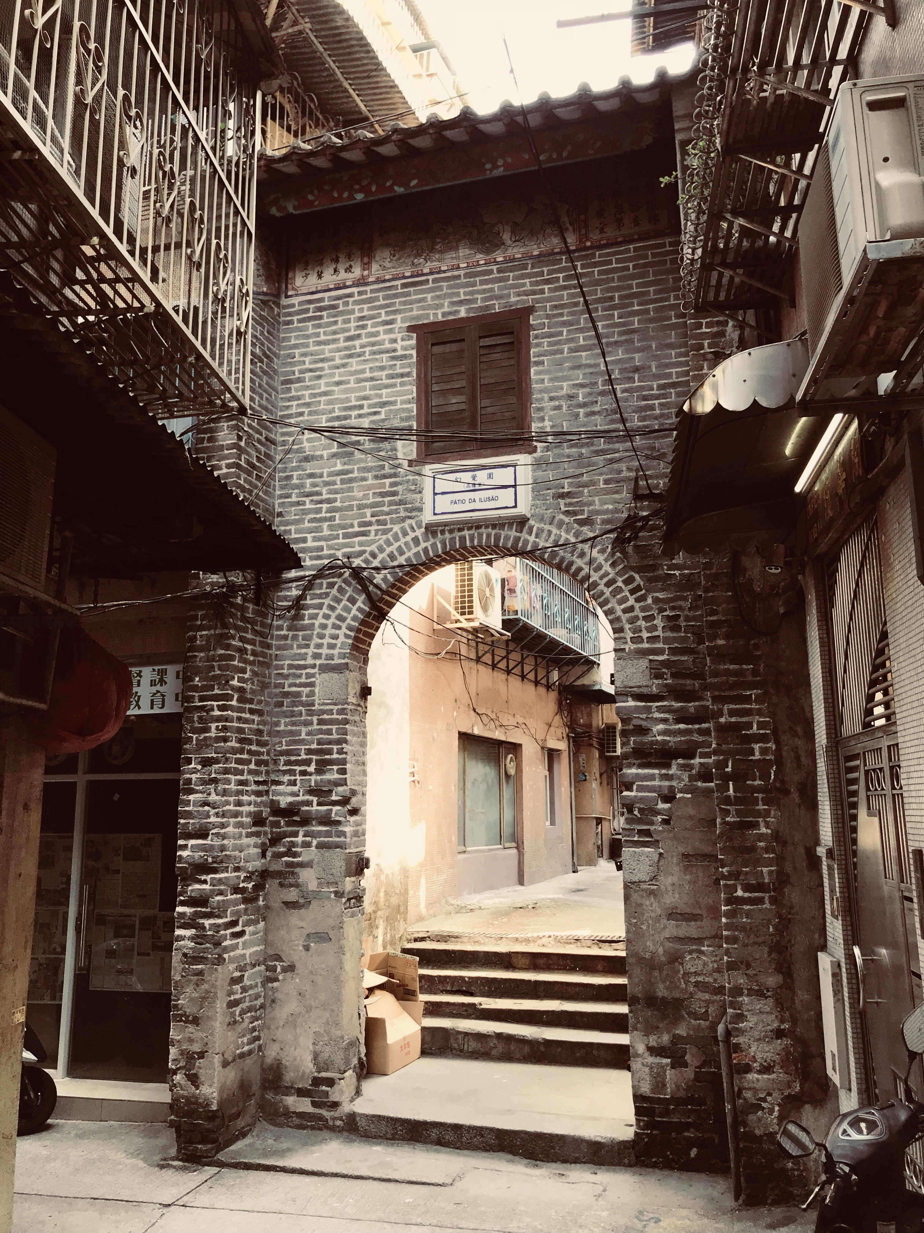 中文（台灣）: 幻覺圍外的入口。